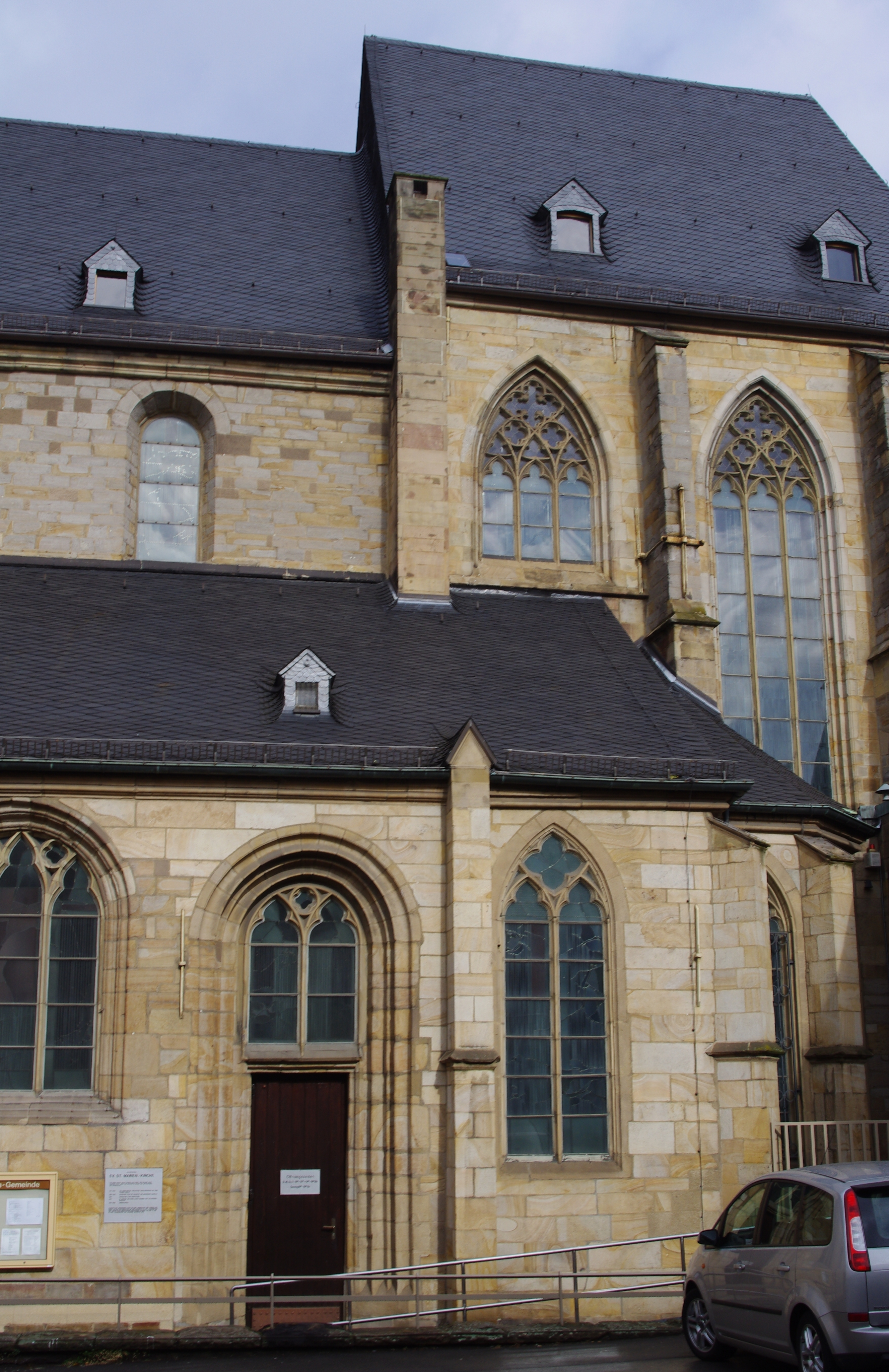 Ansatz des Chores der Dortmunder Marienkirche. Deutlich zu erkennen die unterschiedlichen Baustile: links Romanik, rechts Gotik.